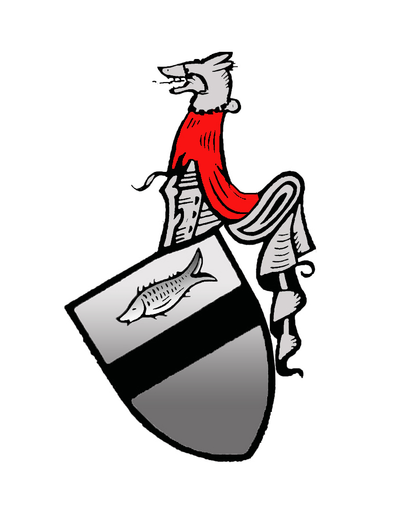 Hürth-Fischenich, Wappen des ausgestorbenen Geschlechtes der "von Vischenich"